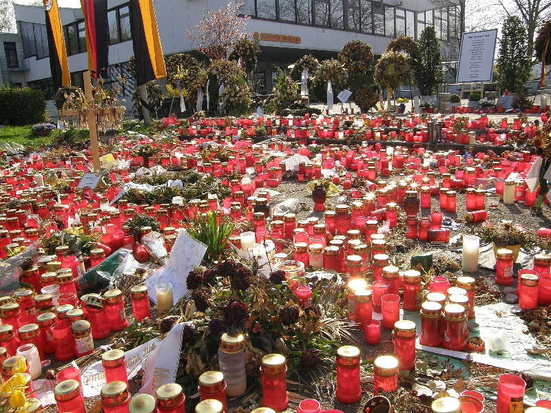 Bilder der Albertville-Realschule aus Winnenden